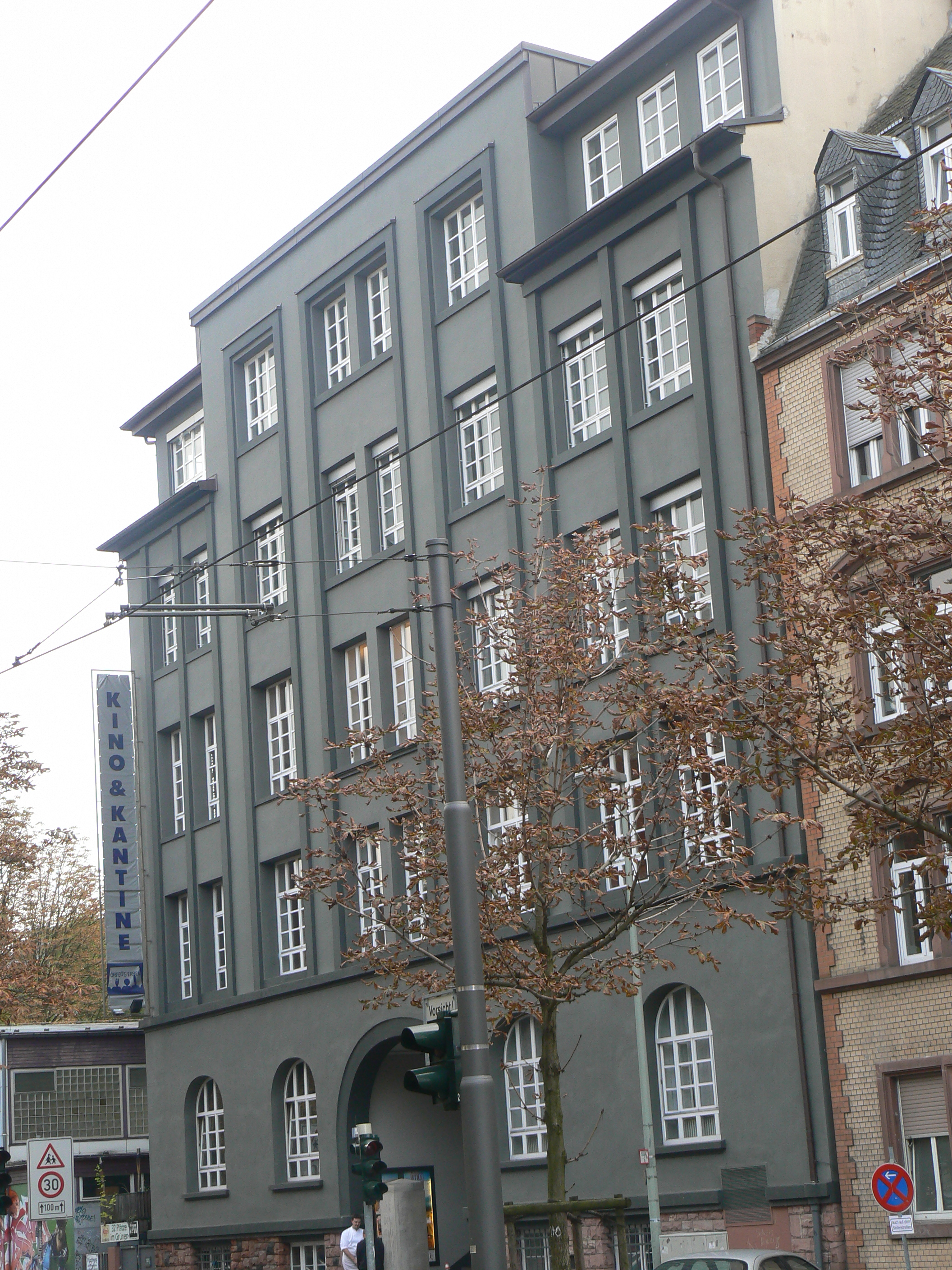 ehemalige Bauersche Schriftgießerei, Gebäude von 1904 in Formen des Industriejugendstils von den Frankfurter Architekten Josef Rindsfüßer und Martin Kühn, heute genutzt durch zahlreiche Medienfirmen, Theater, Kino-Restaurant